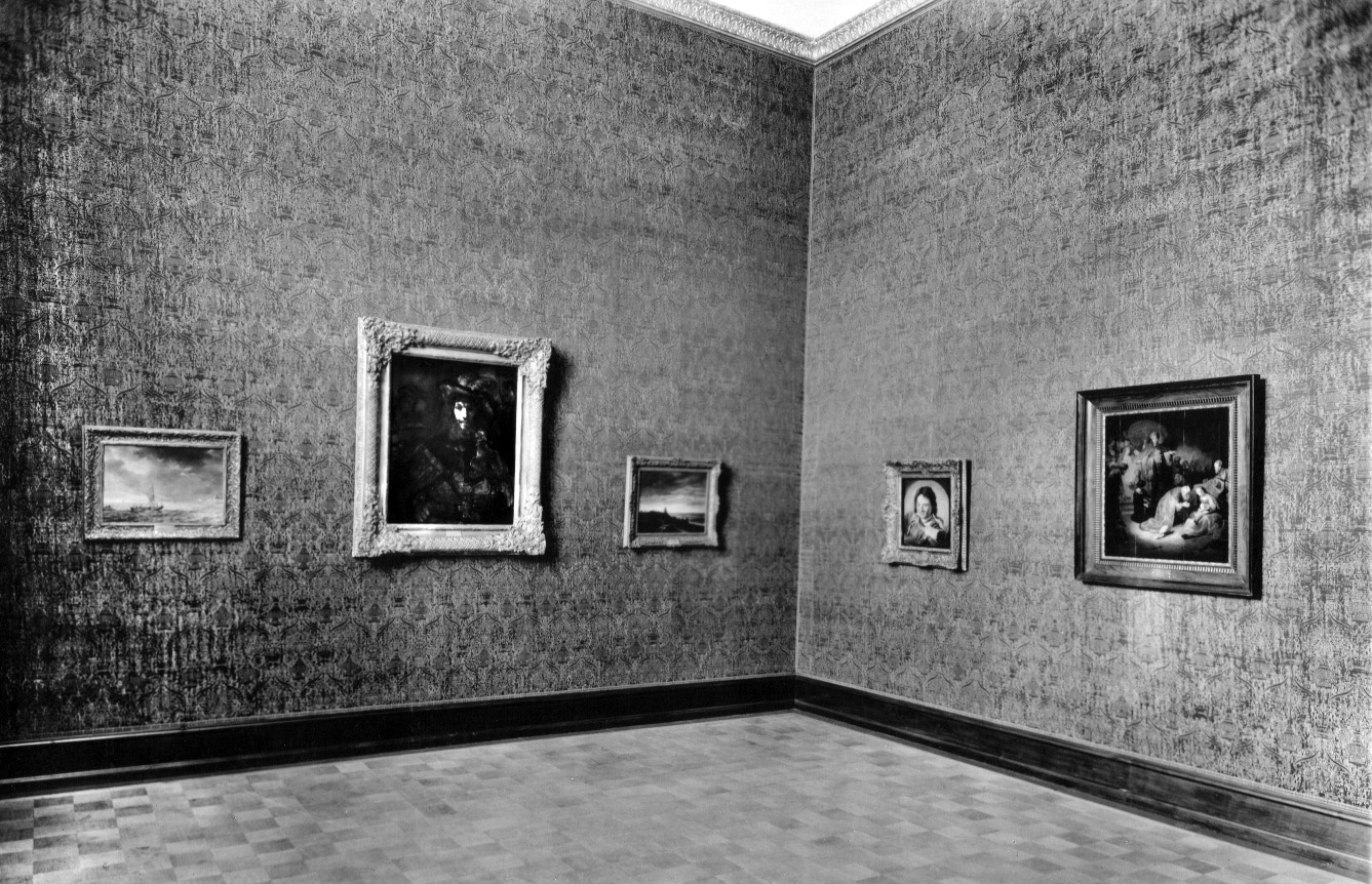 Nederländska rummet Göteborgs konstmuseum mars 1925 där bland annat Rembrandts Riddaren med falken visas.